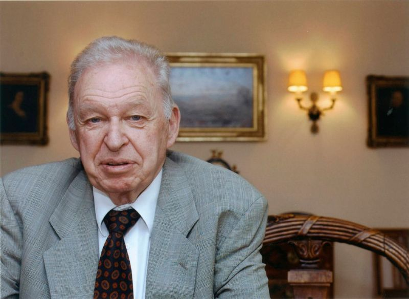 Karl Otmar von Aretin 2002 in München. Fotostudio Jan Roeder, Krailling, mail ; fon 089 850 17 06